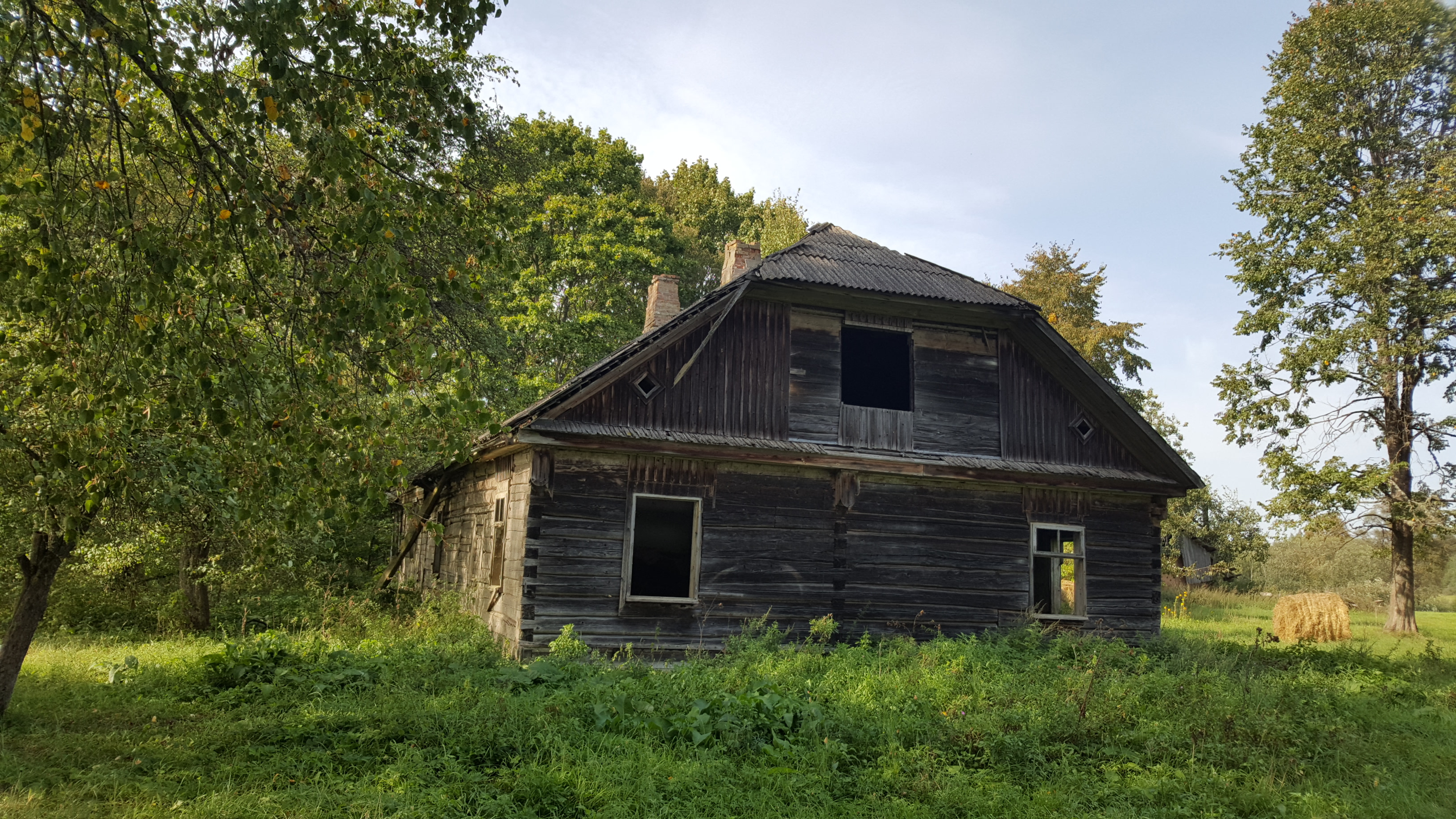 Apleista Laibiškių sodyba